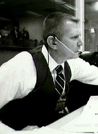 Eugene F. "Gene" Kranz, provided by NASA.